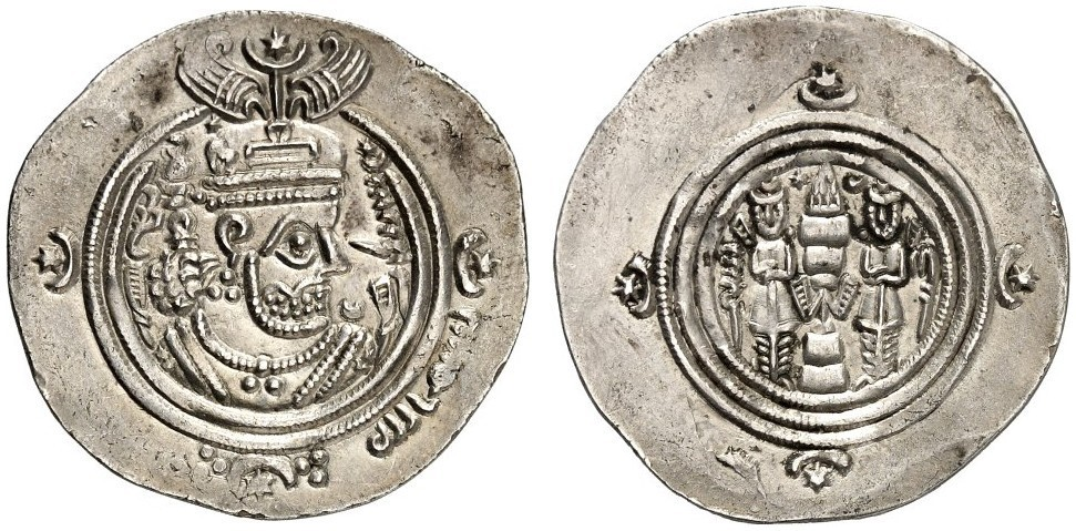 arabo-sasanidische Münze: Gouverneure in Iran. Anonym. AR-Drachme, Jahr 30 (des Yazdgard III., = 661/662 AD), Darabjird; 4,06 g. Drapierte Büste r. mit Krone, im 2. Quadranten des Randes "bism Allah"//Feueraltar zwischen zwei Assistenzfiguren.